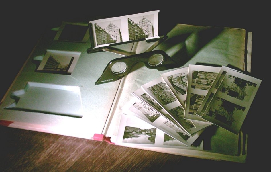 Album mit Raumbildkarten und Spezialbrille: Der Stadt Nürnberg Ursprung und Werdegang, 1949, Raumbild-Verlag Otto Schönstein, Saarbrücken".